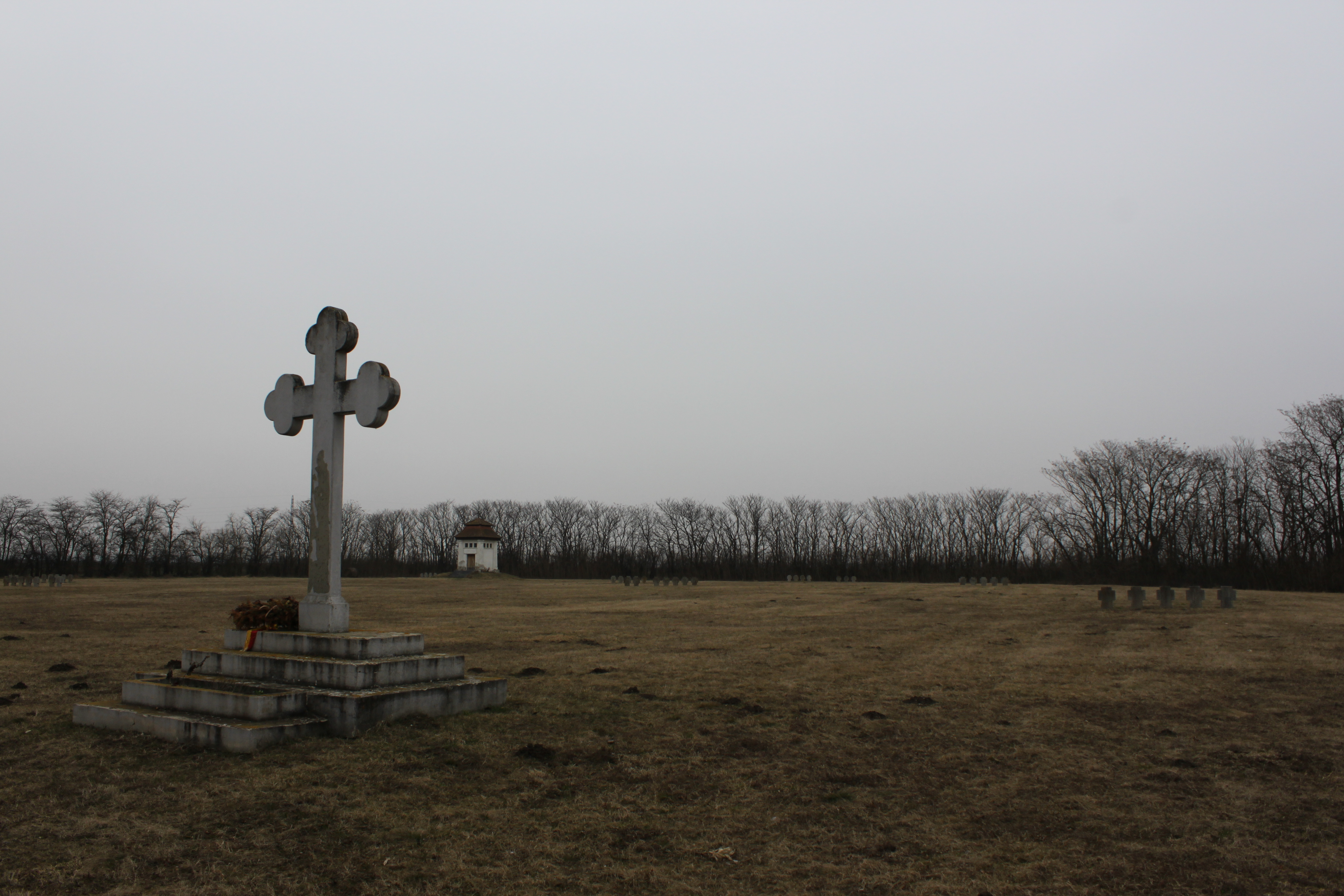 Kriegsgefangenenfriedhof Frauenkirchen